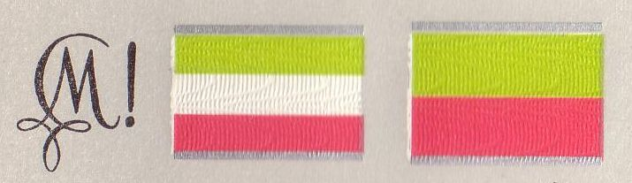 Zirkel, Corpsburschenband und Fuchsenband des Corps Misnia III